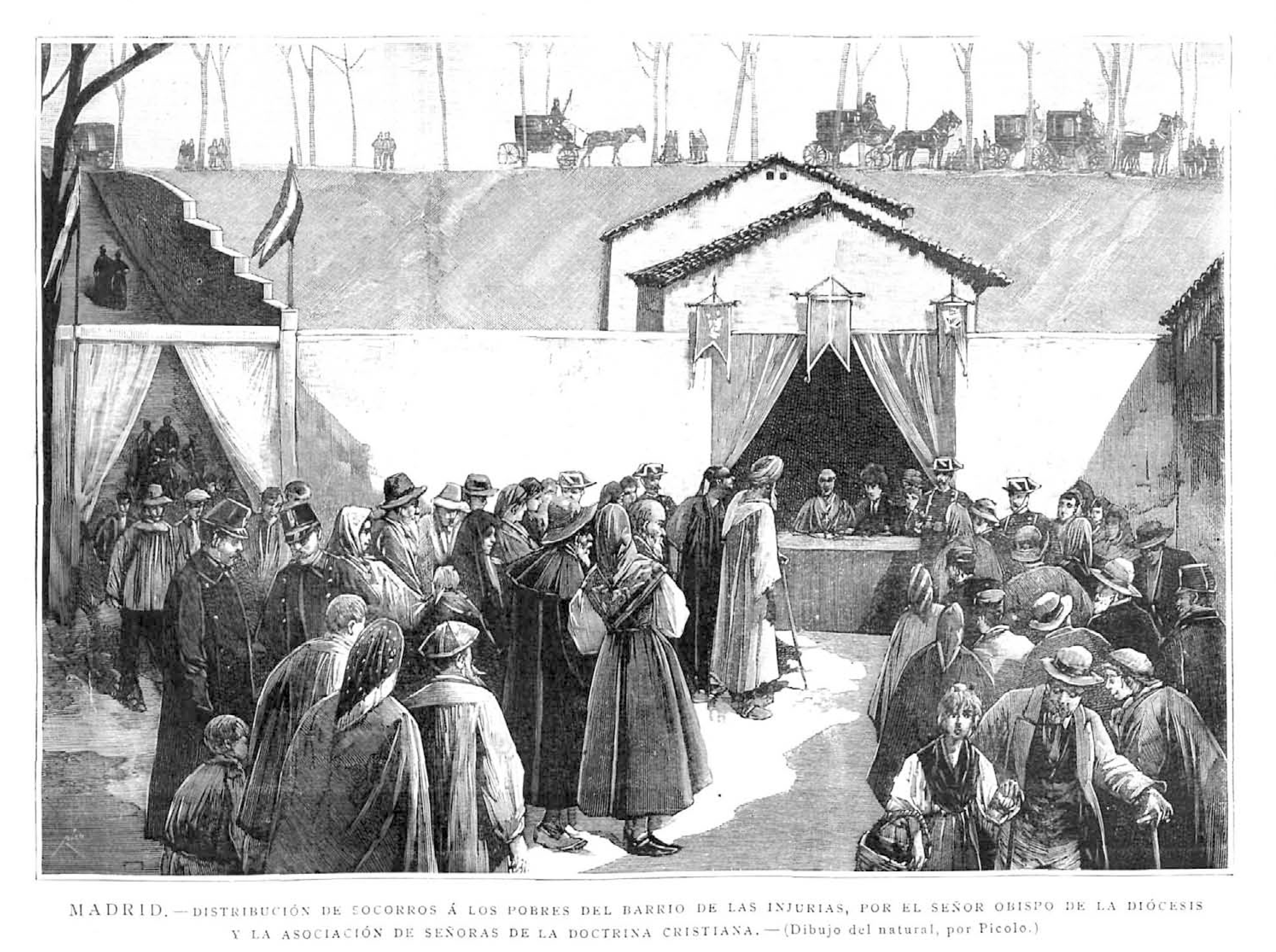 Distribución de socorros á los pobres del barrio de Las Injurias, por el señor obispo de la diócesis y la Asociación de Señoras de la Doctrina Cristiana. (Dibujo del natural, por Picolo).